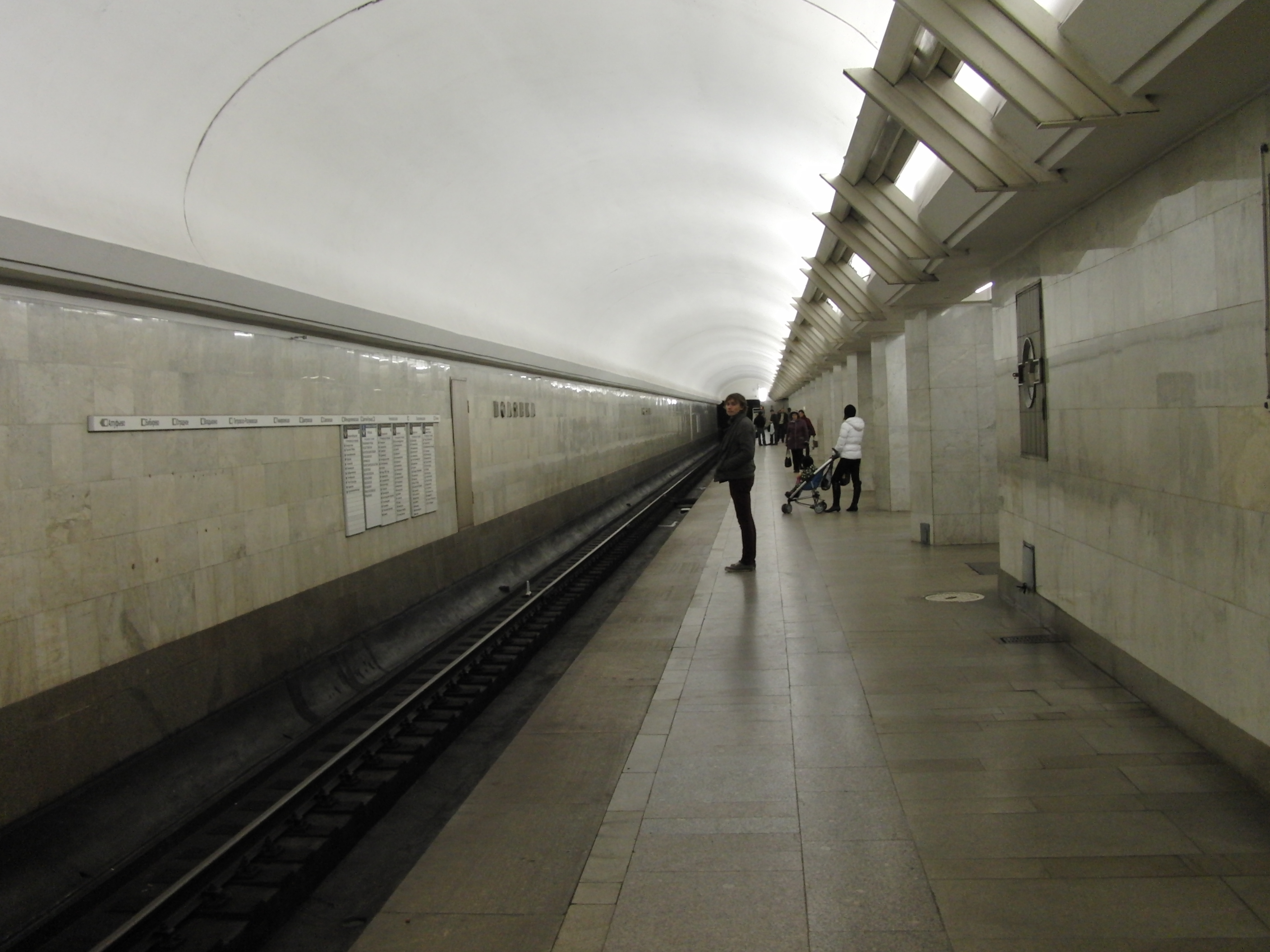 Polyanka (Полянка)